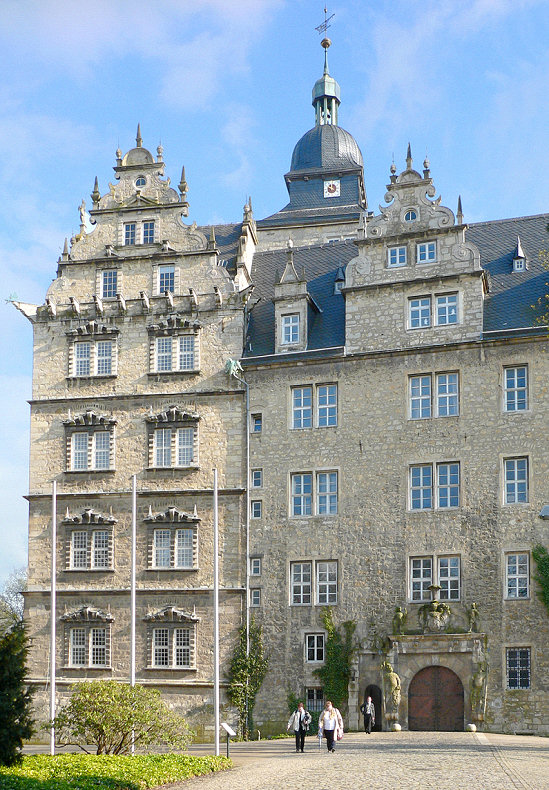 Nordflügel von Schloss Wolfsburg mit Eingangstor, früher Zugbrücke